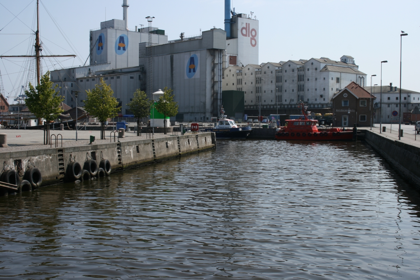 Århus Å ved udmundingen i Århus.